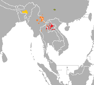 Lenguas khmúico-khásico Khásico Paláunguico Khmuico Pakánico